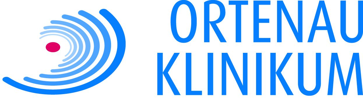 Logo vom Ortenau Klinikum